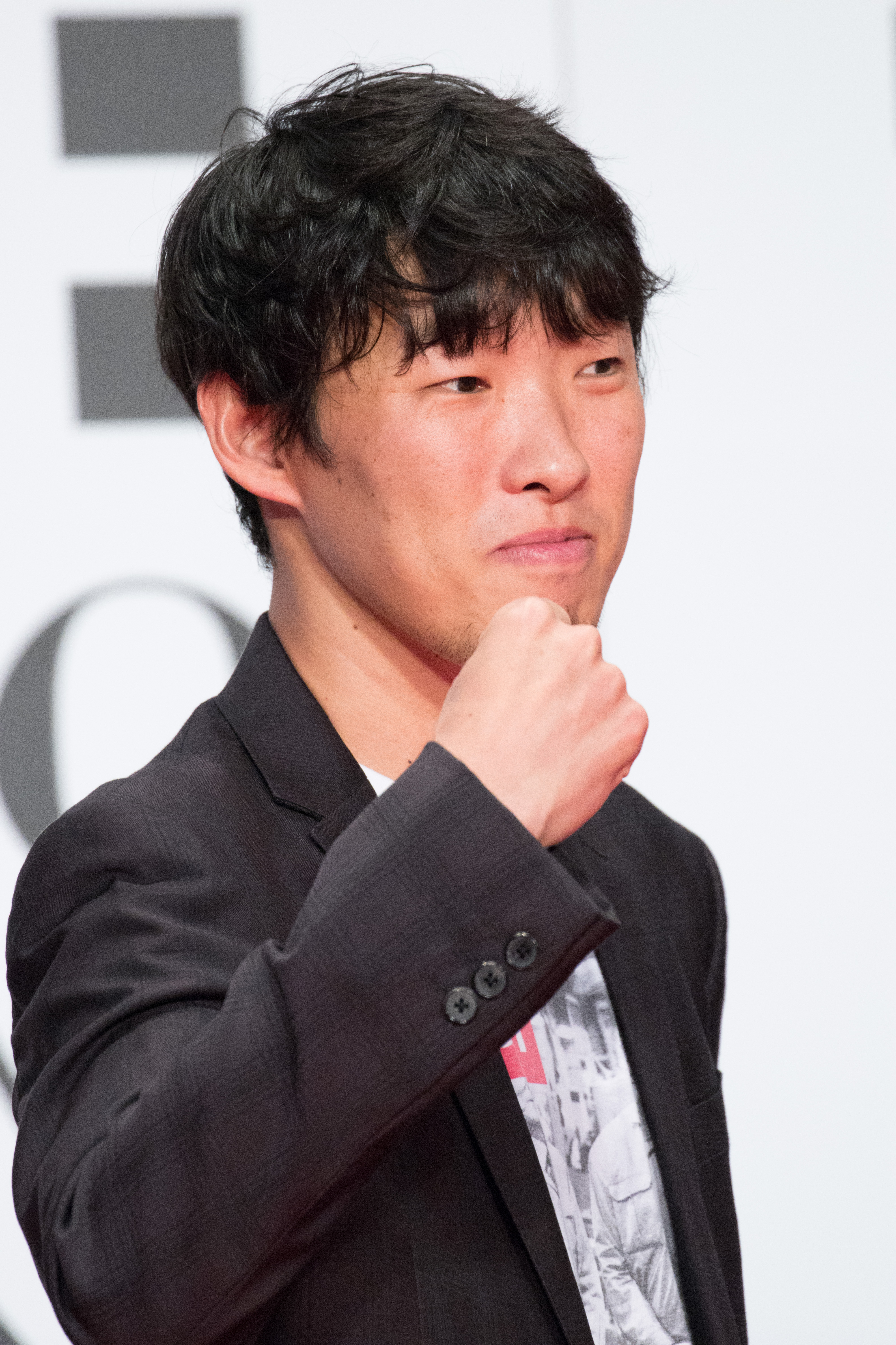 第29回 東京国際映画祭 オープニングセレモニー 松江哲明 (俺たち文化系プロレスDDT)